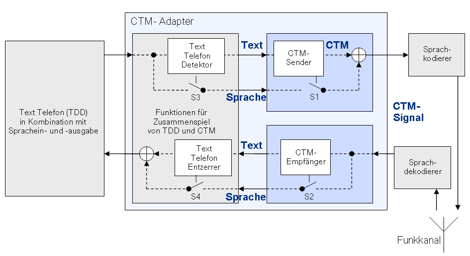 Die Grafik stellt die Verarbeitung der Signale innerhalb des CTM-Adapters schematisch dar.